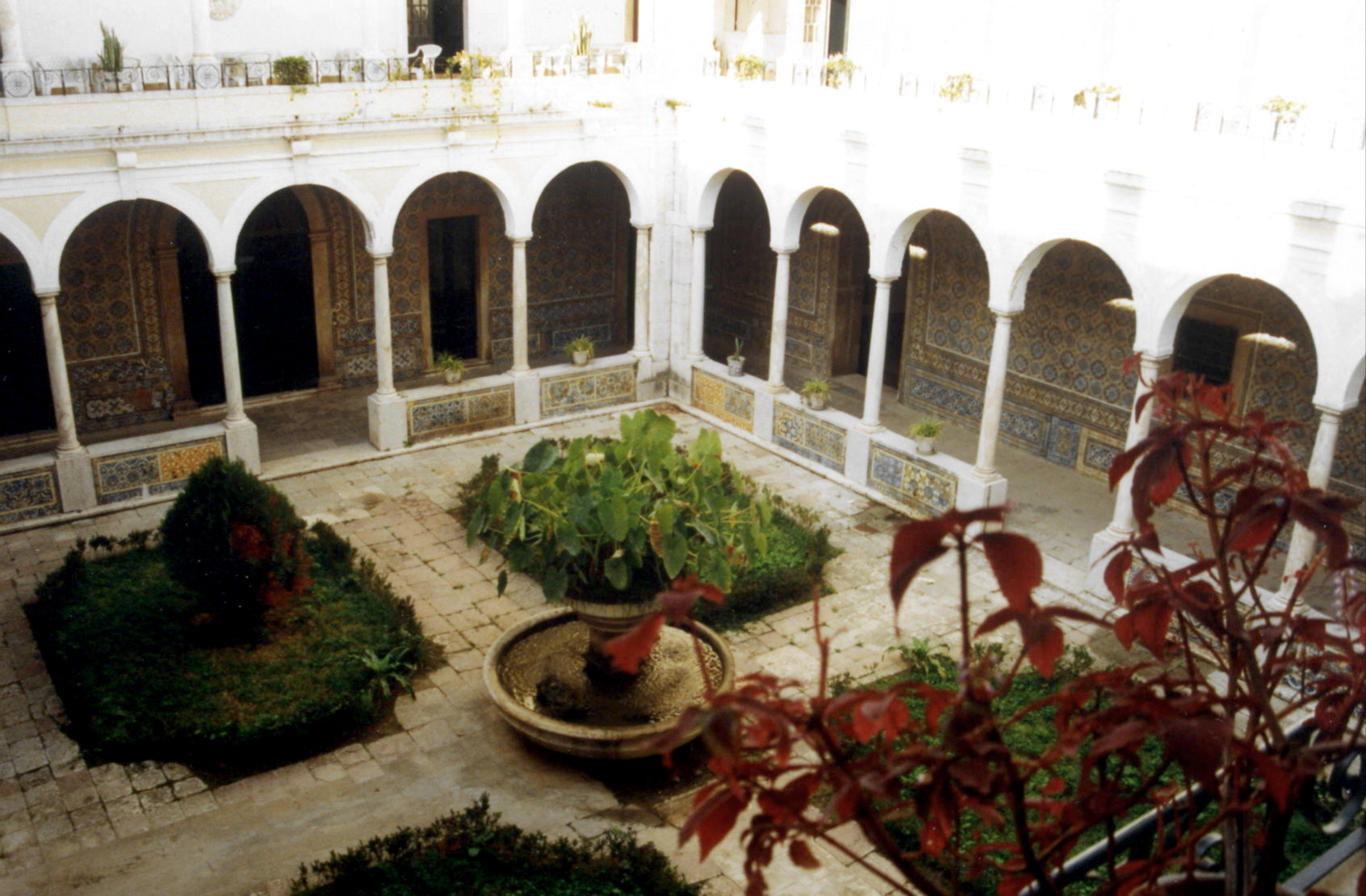 Antigo Convento de Nossa Senhora dos Mártires e da Conceição de Sacavém